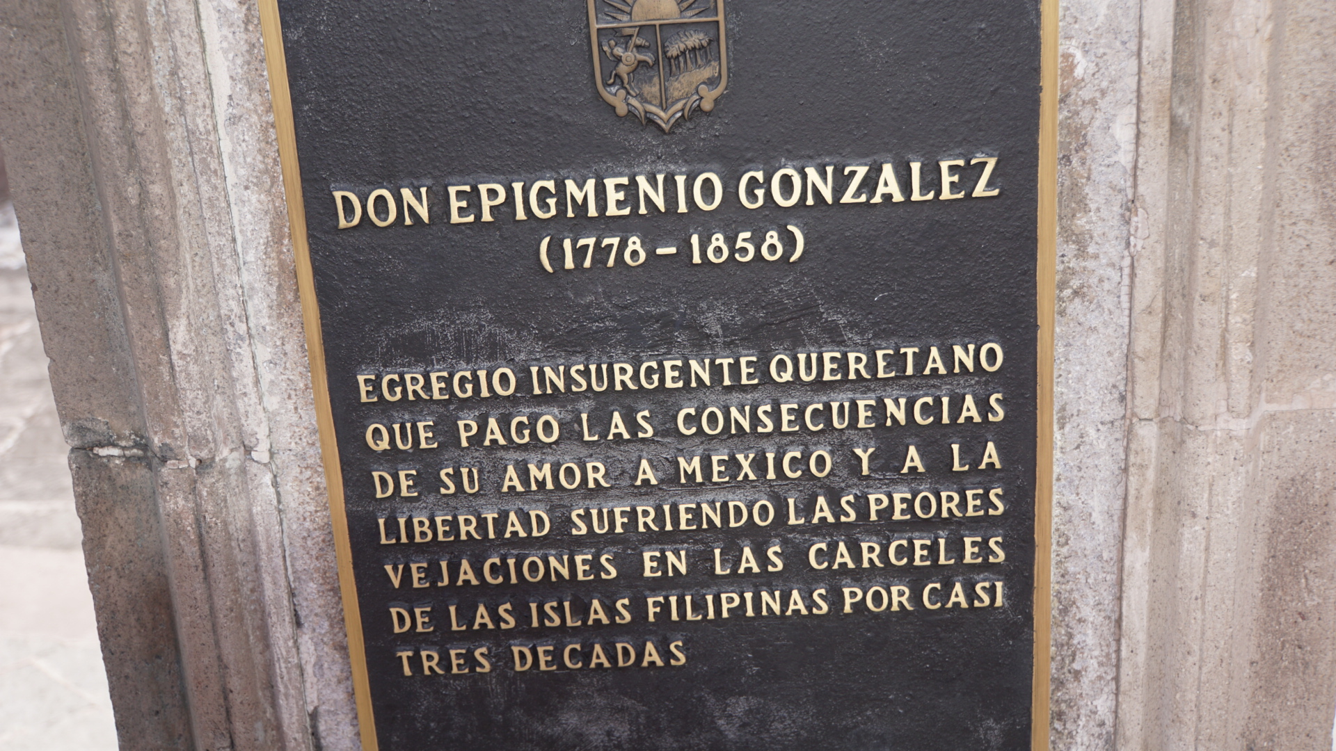 Escultura de Epigmenio González Flores, en la Ciudad de Santiago de Querétaro, Querétaro, México